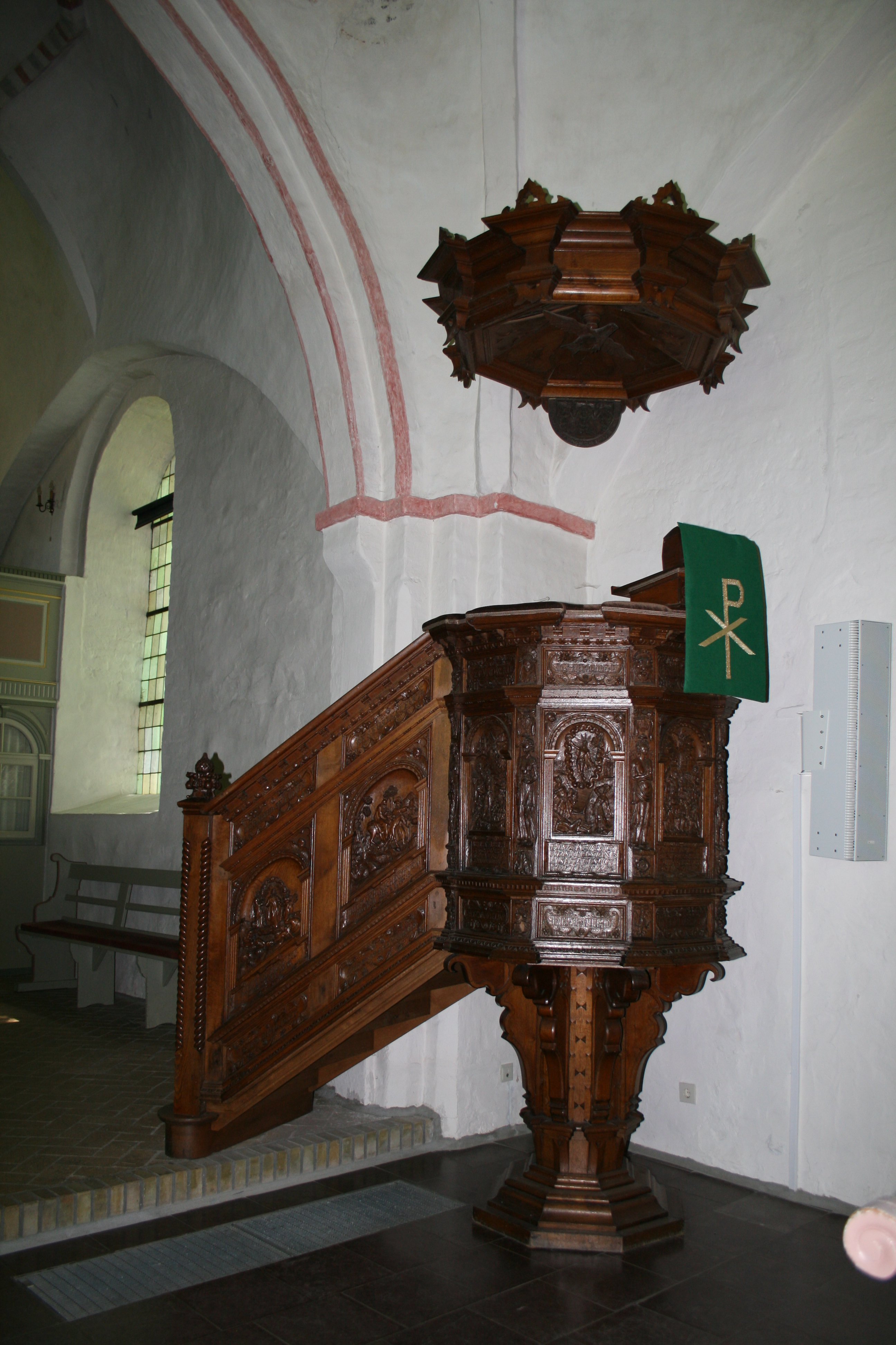 Kanzel der Kirche Sieseby